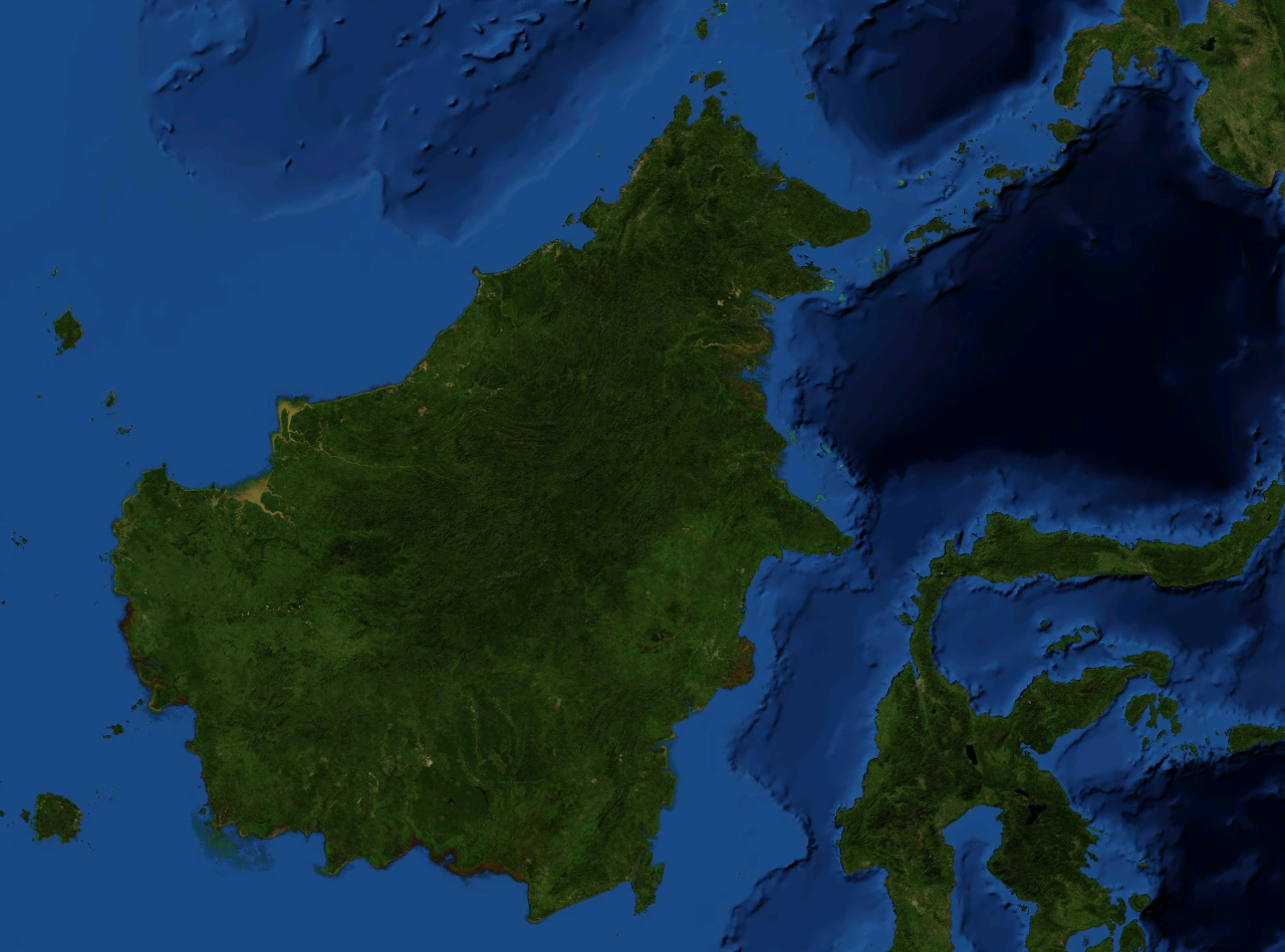 Copy of [Gunung Kongkemul Borneo.png], without the marker